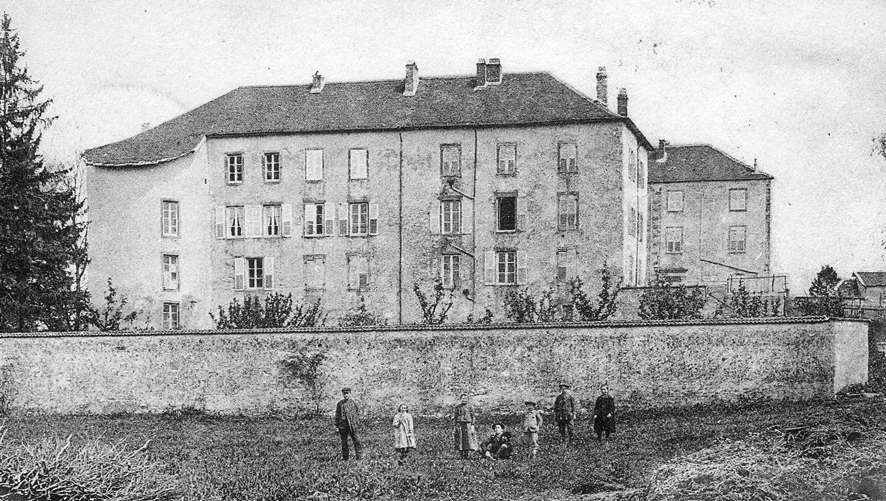 Vue du château d'Albestroff (Moselle/France) d'après une carte postale de 1902